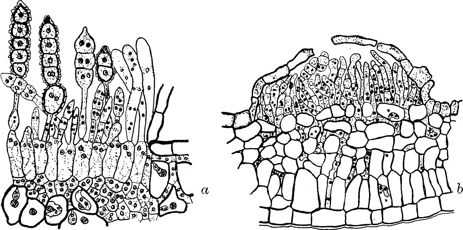 Fig. 180. a. Phragmidium Rubi Vets.; teleutosorus, x 240; after Sappin-Trouffy; b. Phragmidium Violaceum Wint.; teleutosorus, X240; after Blackman..